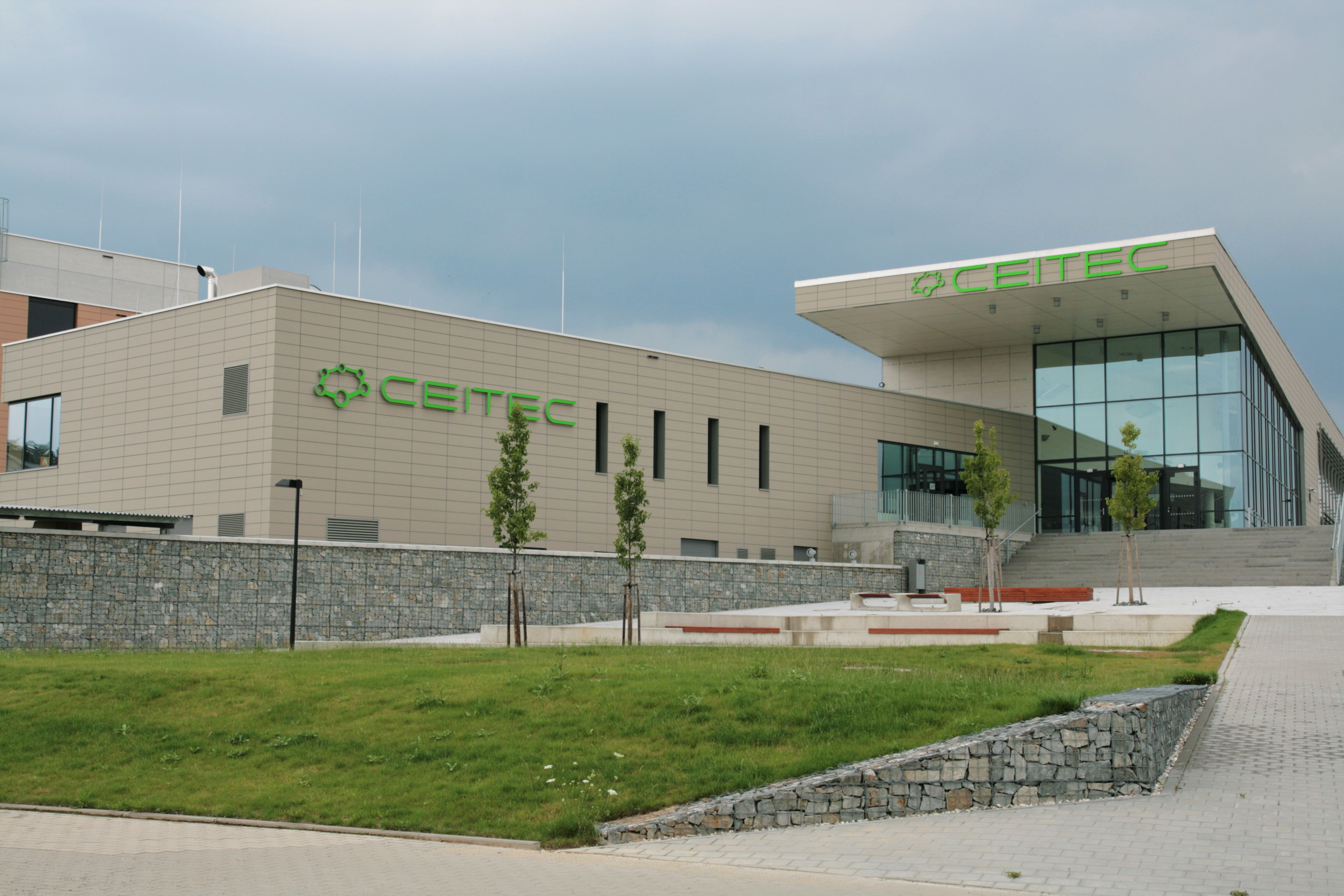 Středoevropský technologický institut (Central European Institute of Technology, CEITEC) - Vysoké učení technické Brno, Purkyňova 656/123, Brno-Medlánky.